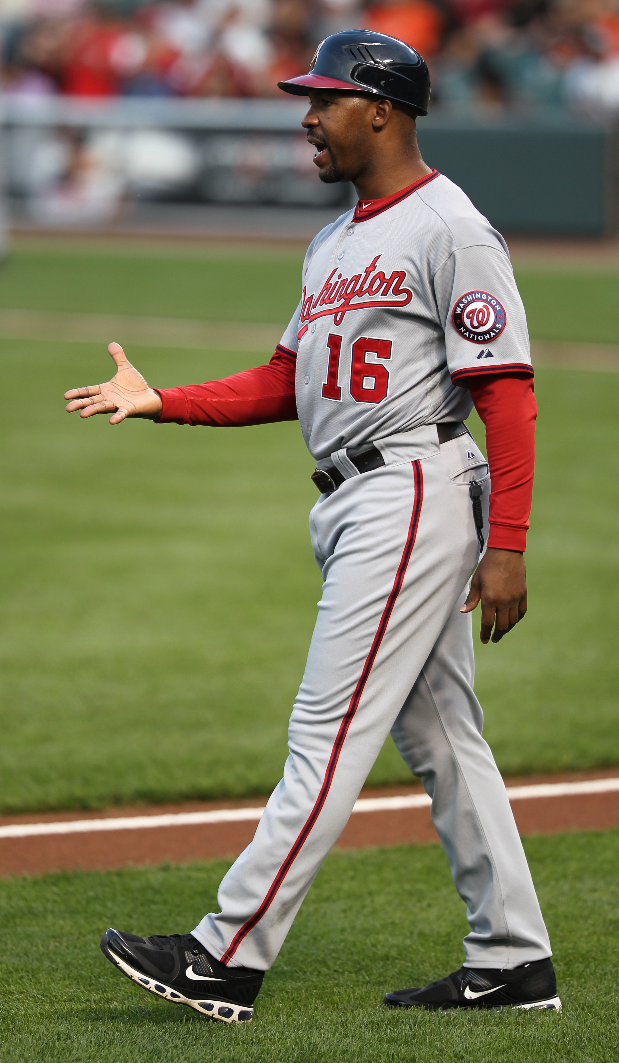 Bo Porter